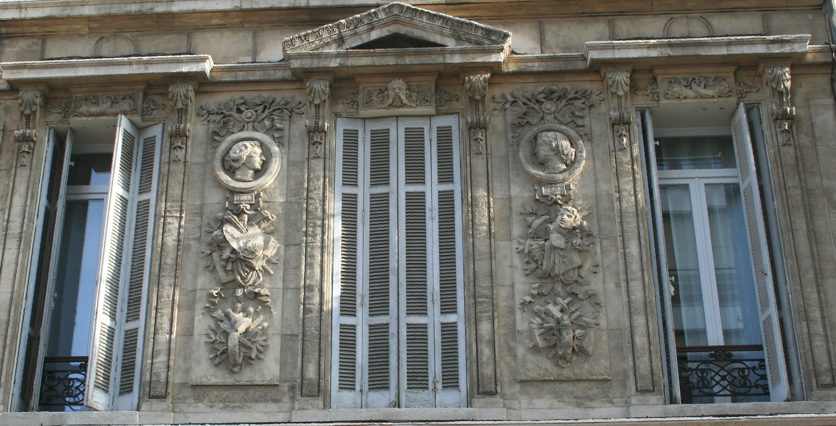 Sculpture de la façade de l'immeuble situé au 11 rue Maurel à Marseille réalisée par Aldebert qui a habité cette maison.